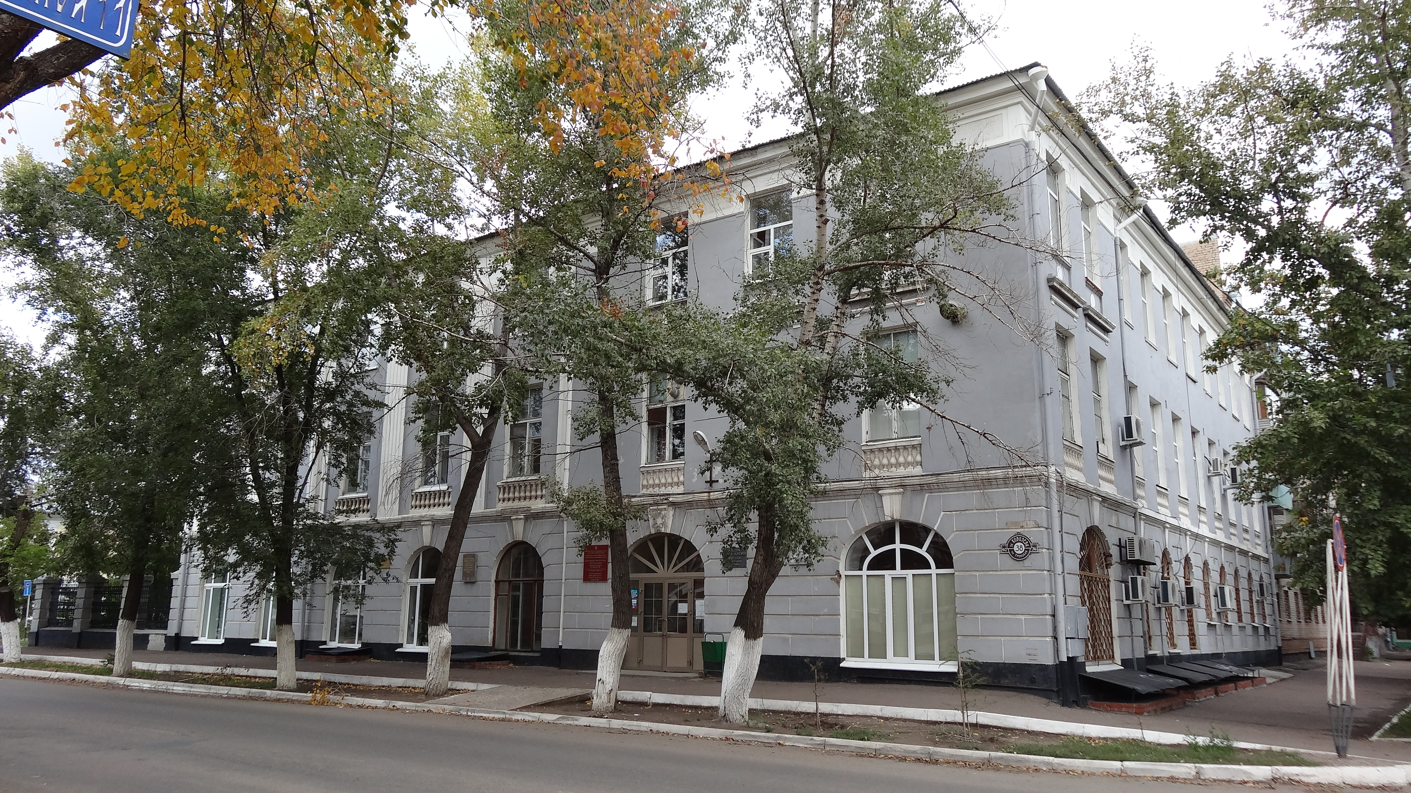 Здание Азовско-Донского банка (Оренбургская область, Оренбург, Соляной переулок, 14, Бухарский переулок, 11)